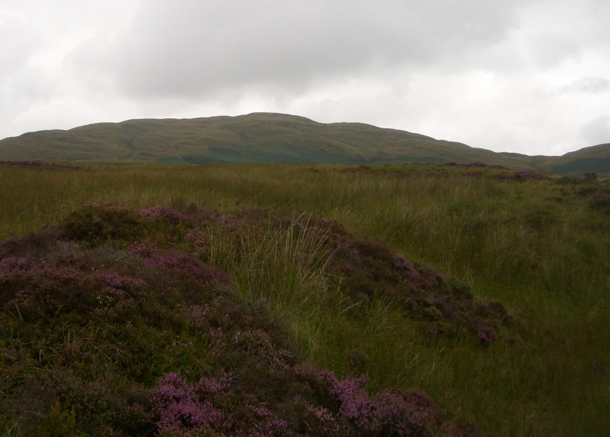 Foel Goch from Cwm Da